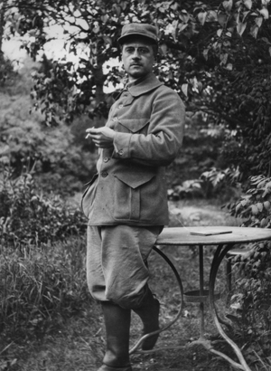 René-Maurice Gattefossé, engagé volontaire lors de la première guerre mondiale